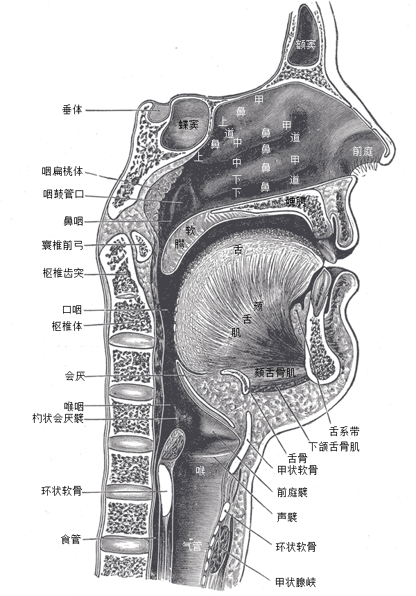 鼻、口、咽、喉的矢状切面。